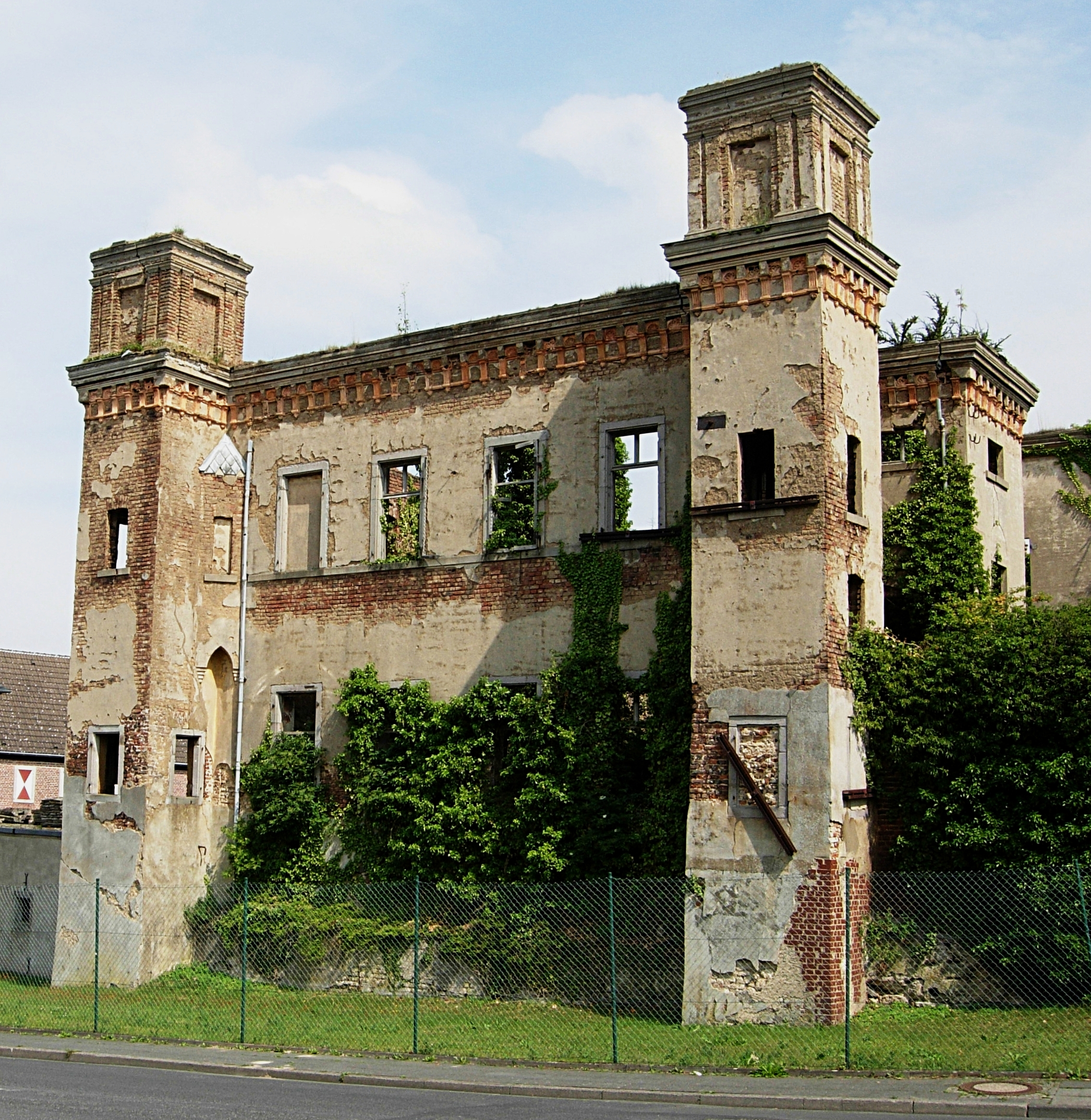 Schlossruine an der Jennerstraße in Hemmerich, ein Ortsteil der Stadt Bornheim (Rheinland) nordwestlich von Bonn. Als Maueranker geschmiedete Ziffern weisen auf 1713. Das Schloss wurde zu Beginn des 18. Jahrhunderts auf dem Areal einer Burg errichtet, deren Anfänge mindestens ins 13. Jahrhundert reichen. Es fiel 1869 und 1906 Bränden zum Opfer. Das Herrenhaus wurde nach Plänen des schwedisch-preußischen Architekten und Malers Wilhelm Grafen Mörner (1831–1911), der zweitweise in Roisdorf wohnte[1], wieder aufgebaut. 1945 (nach Kriegsende) brannte es ein drittes Mal aus und ist seitdem eine Ruine, heute im Besitz der Familie von Nordeck. ↑ in dem selbst entworfenen Haus Wrede (früher Haus Mörner) am Siefenfeldchen in Roisdorf